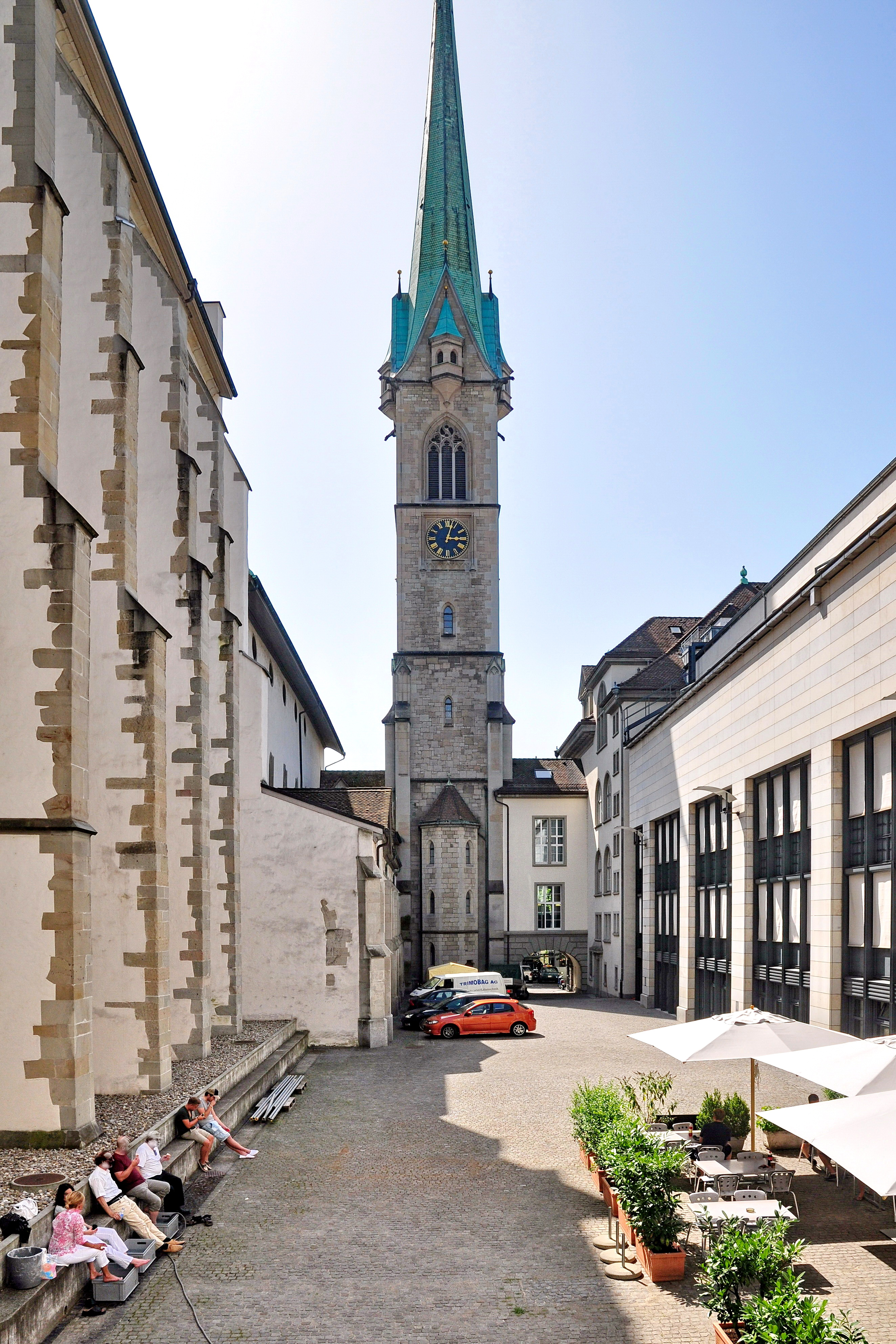 Predigerkirche & Zentralbibliothek in Zürich (Switzerland)